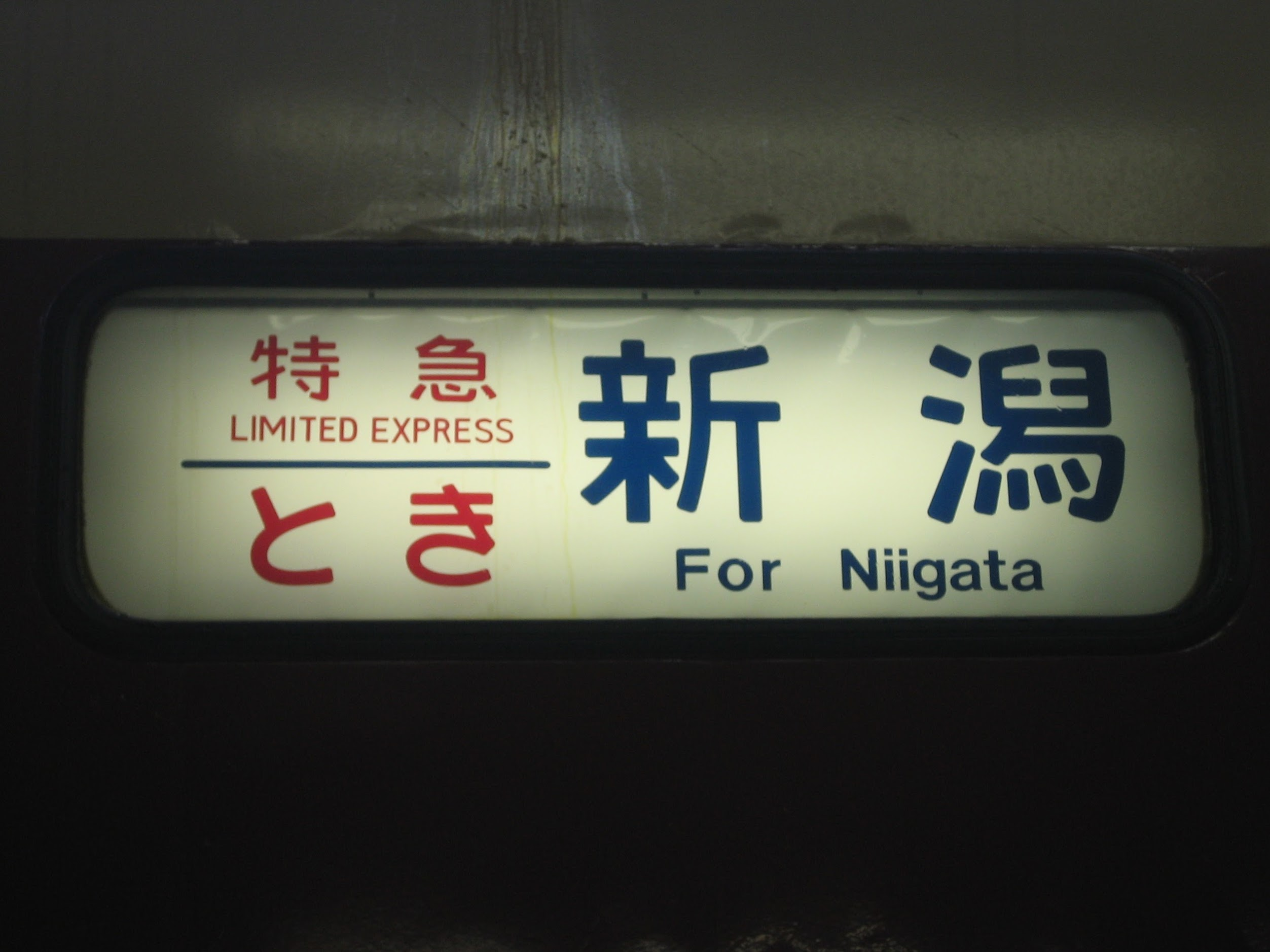 特急ときの方向幕（新潟行き）